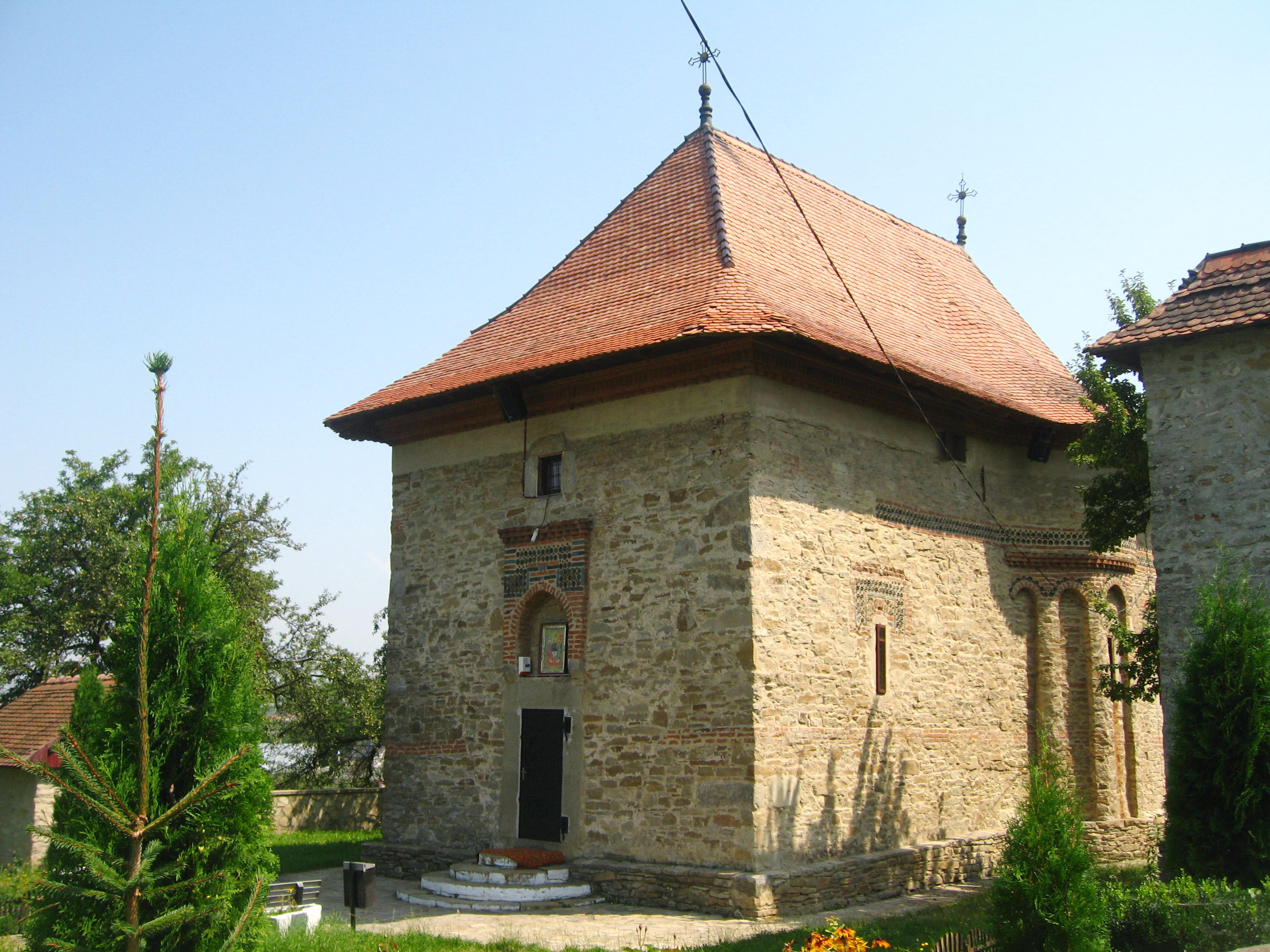 Biserica Sf. Treime din Siret